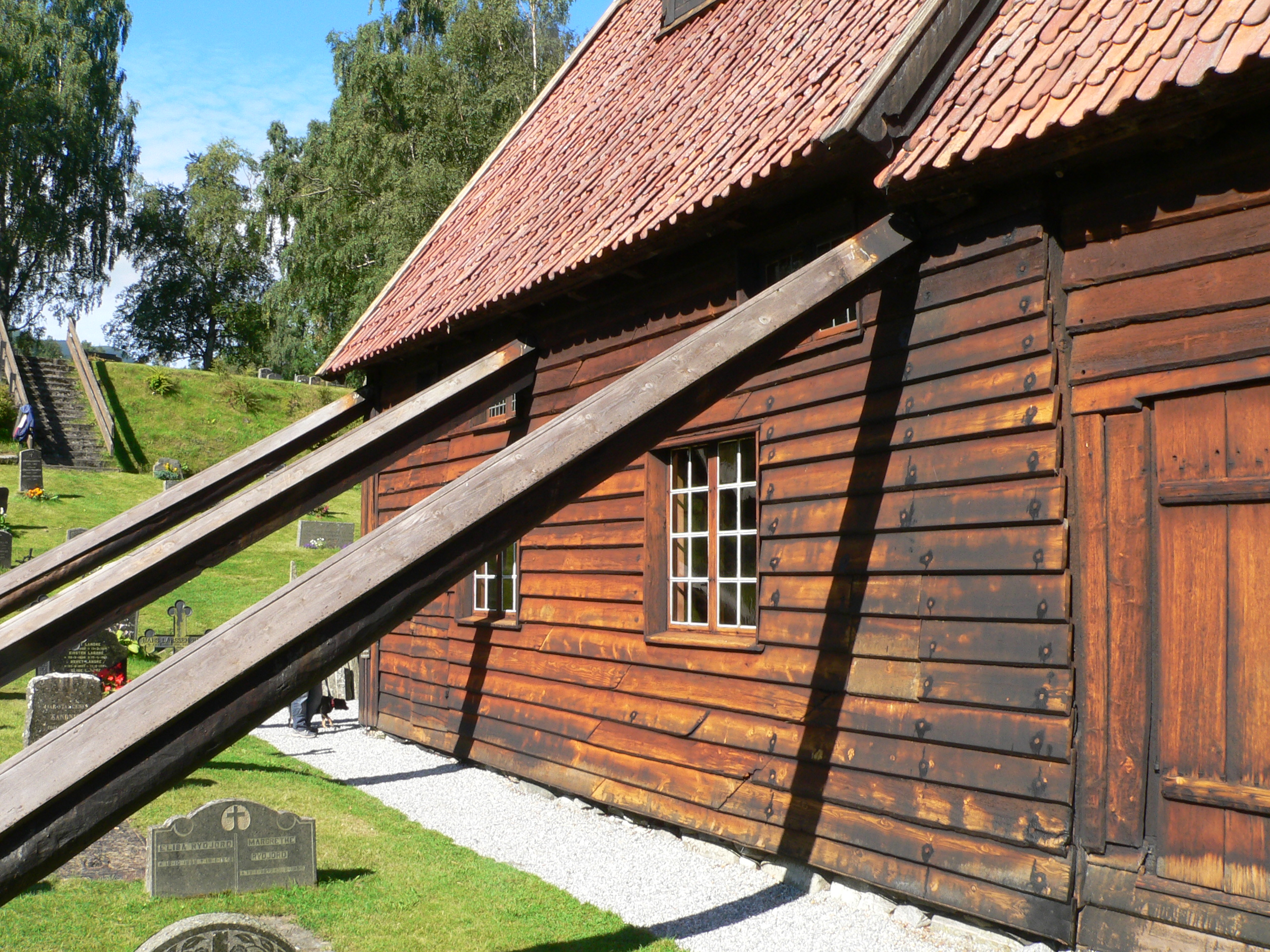 no: Rødven stavkyrkje en: Rødven stave church